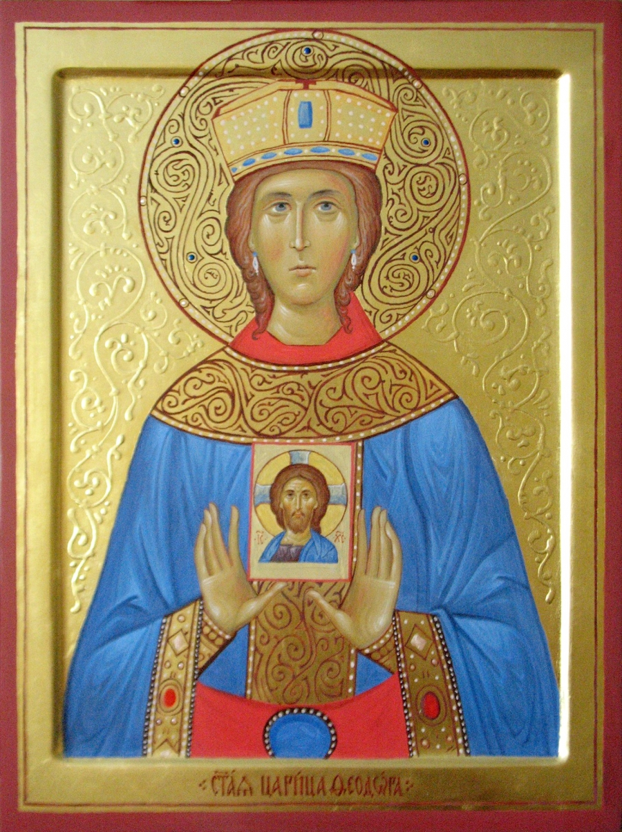 Царица Феодора, восстановившая почитание икон